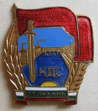 Значка "Отлични на КДС" 1965-1969